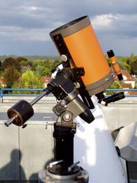 Das Celestron C8 der Sternwarte Heilbronn